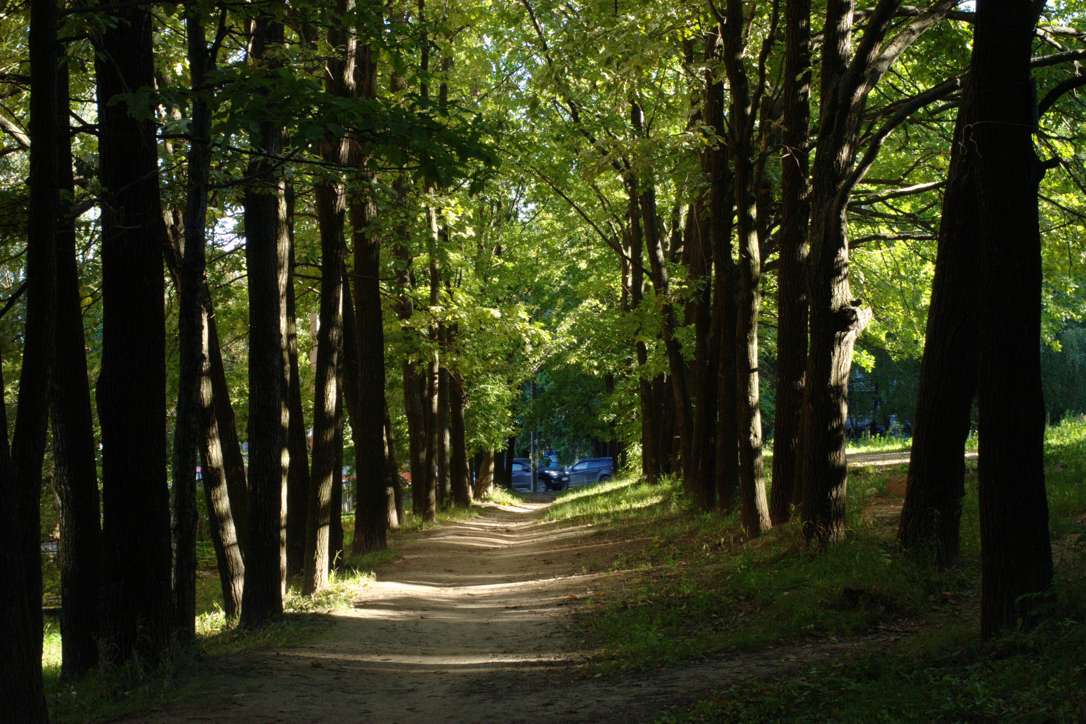 Начало аллеи в сторону ул. Рокосовского. Дубовая аллея в Кузнечихе-1: Г. Нижний Новгород, Советский район, Кузнечиха-1, от улицы Быкова до улицы Рокоссовского, пересекая бульвар "60 лет Октября",Нижний Новгород, Нижегородская область This image is related to the protected area of Russia number 5210383